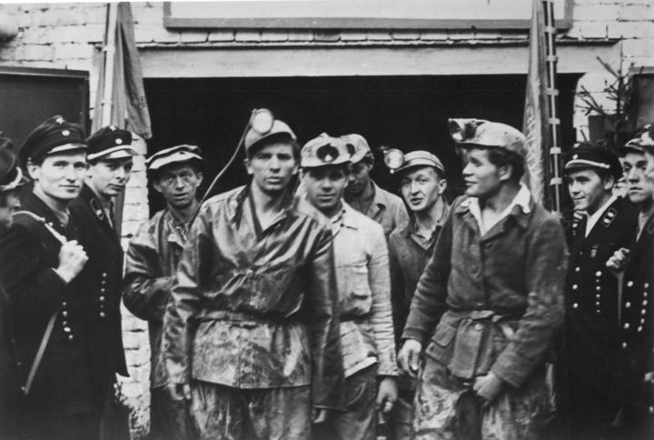 Bergarbeiter aus dem Schacht kommende Kollegen empfangend Zentralbild IG.Wismut 24.9.1952 Brigade Hans Bleisch erfüllte 5-Jahresplan in 20 1-2Monaten.Die Jugendbrigade des 23-jährigen Helden der Arbeit Hans Bleisch vom Objekt-Gewerkschaftsvorstand Libor der AG Wismut hat bereits am 16.9.1952 die ihr im Fünfjahrplan gestellten Produktionsaufgaben erfüllt.UBz: Die Brigade Bleisch wird nach ihrer bedeutungsvollen Schicht am 16.9.1952 von Kollegen am Mundloch empfangen.